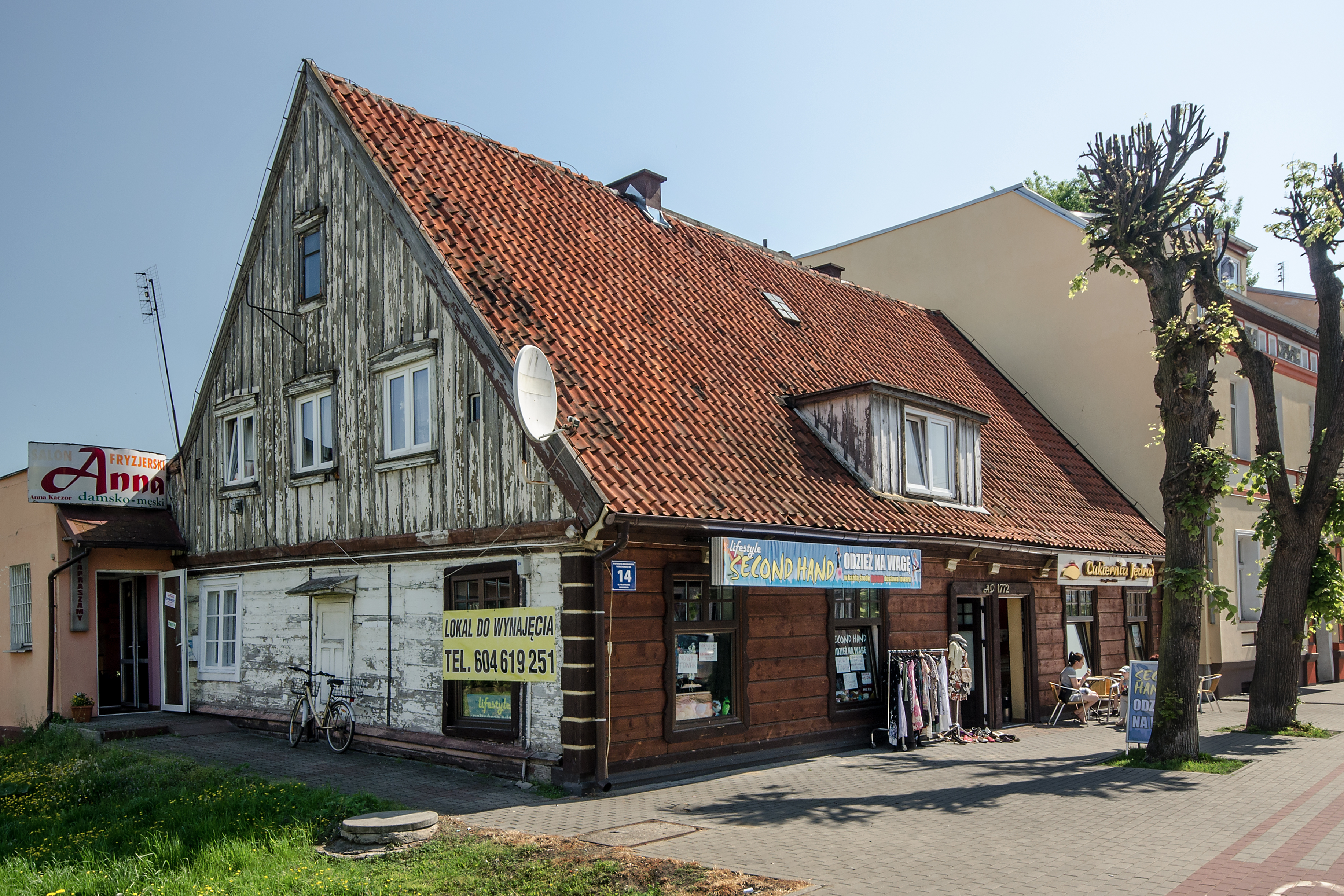 Nowy Dwór Gdański, ul. Sikorskiego 14 - dom, poł. XIX